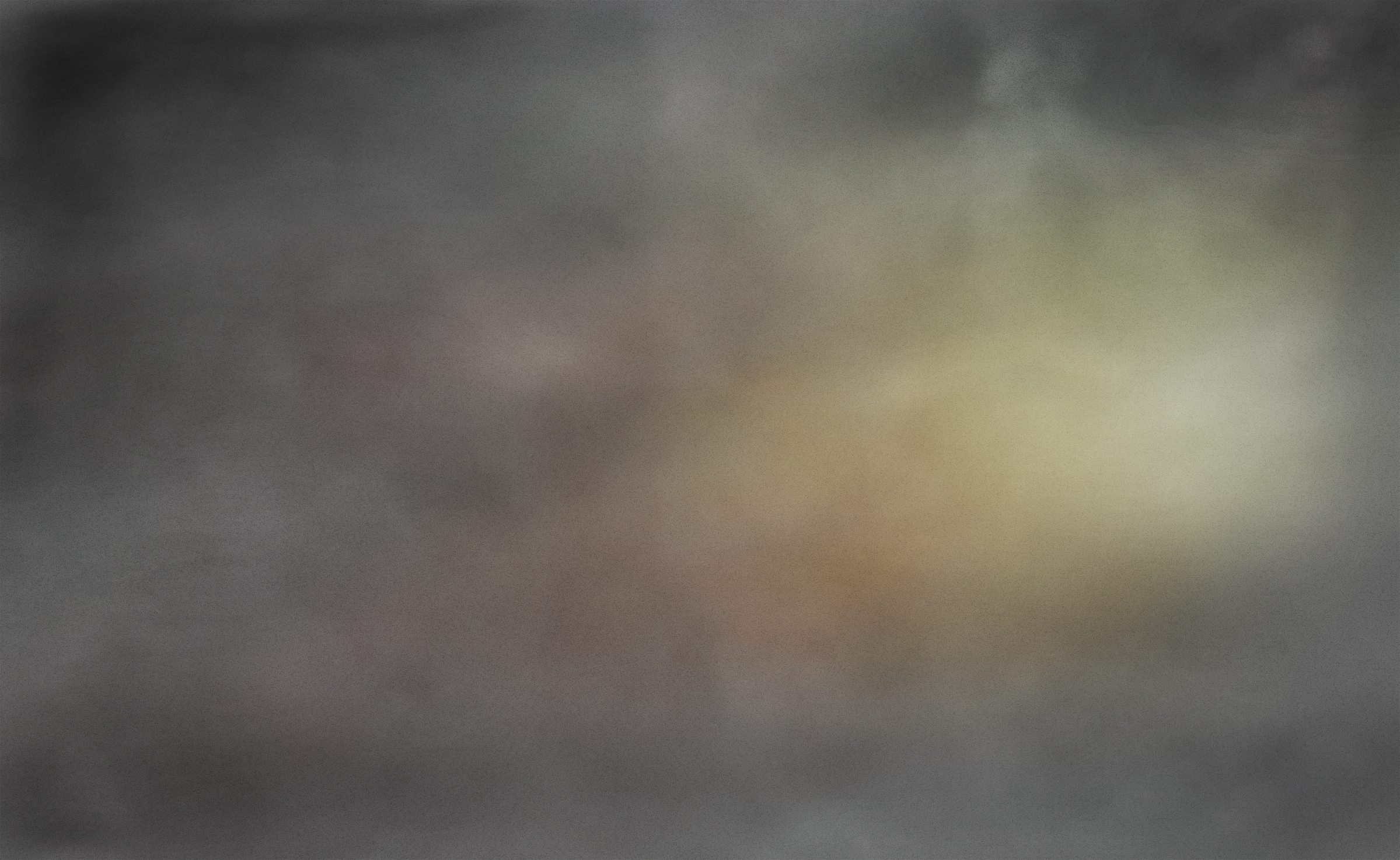 Пример абстрактной растровой текстуры